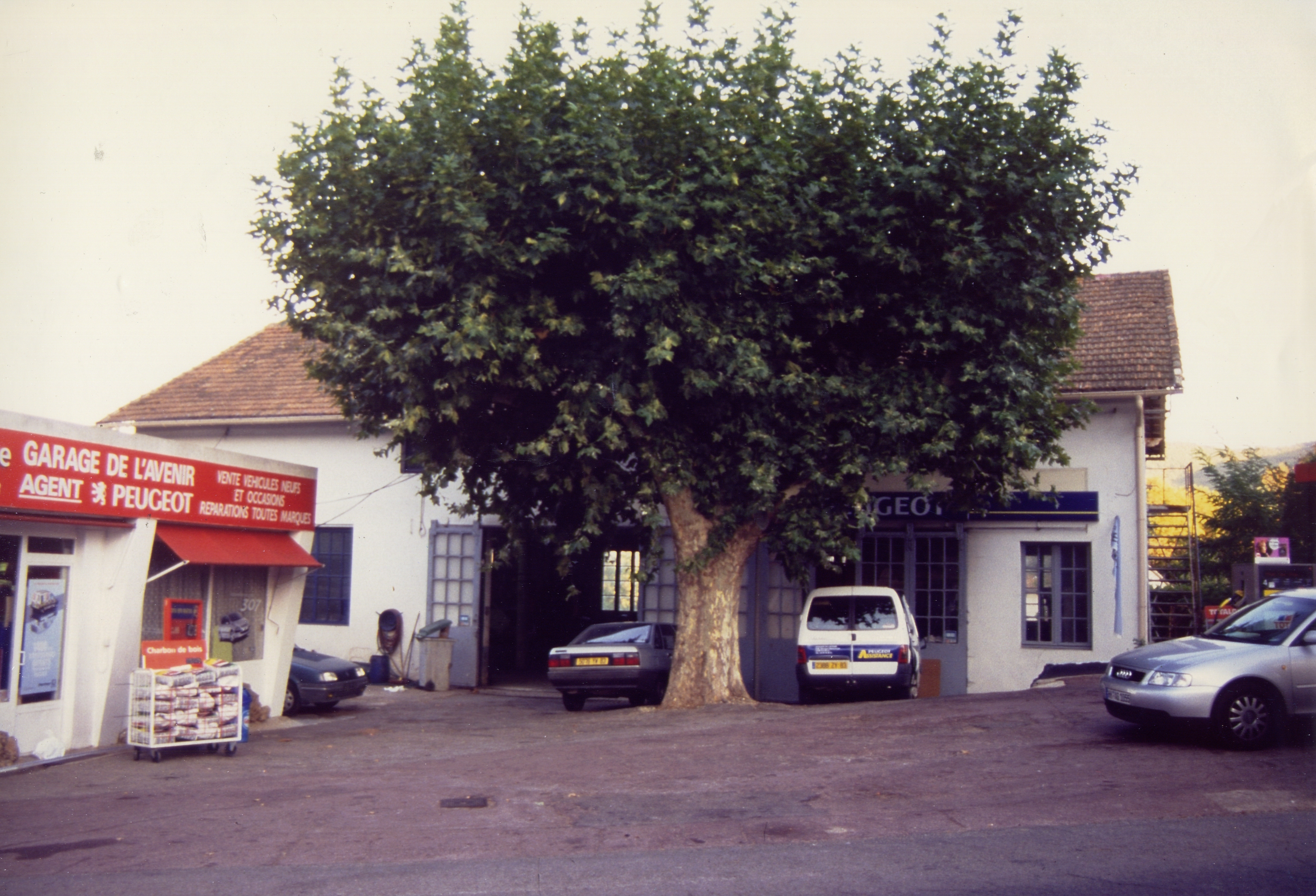 Garage de l´Avenir in Gonfaron